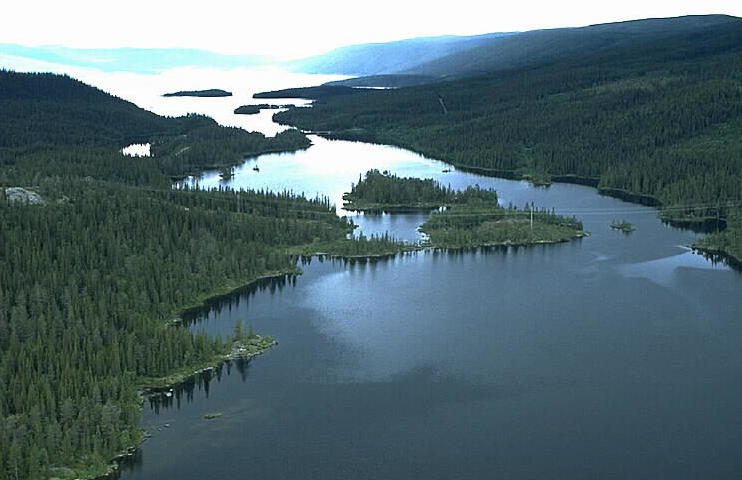 Motiv: Björkvattensdalen Nyckelord: Flygbilder, Riksintressen Kategori: Insjömiljöer Björkvattensdalen